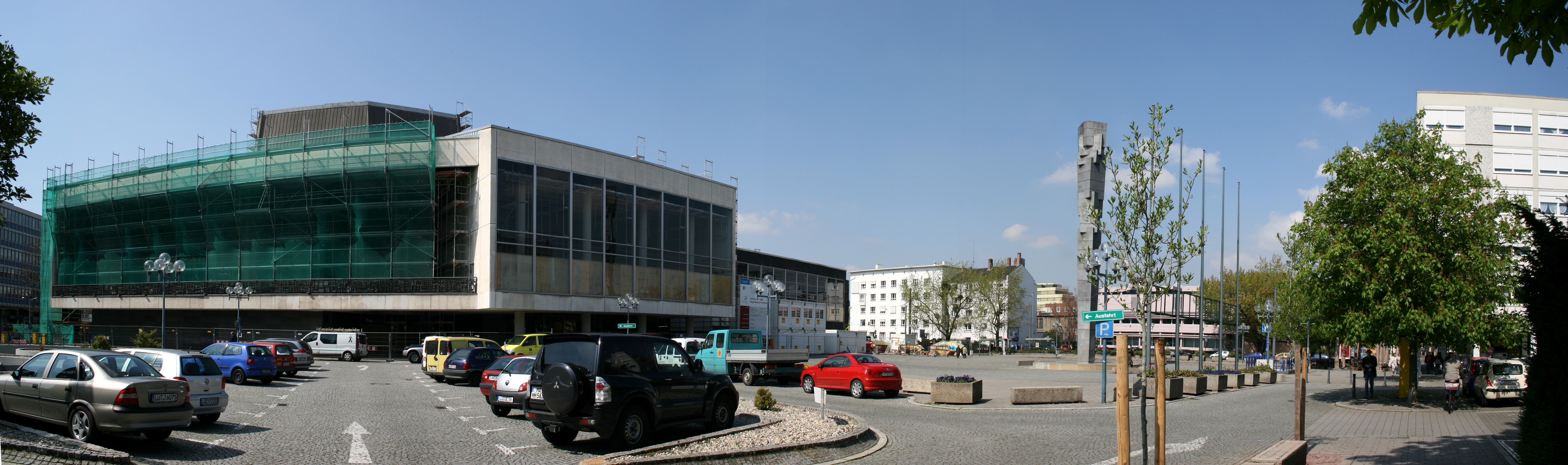 Bild vom Pfalzbau in Ludwigshafen; Stitch aus 4 Einzelbilder